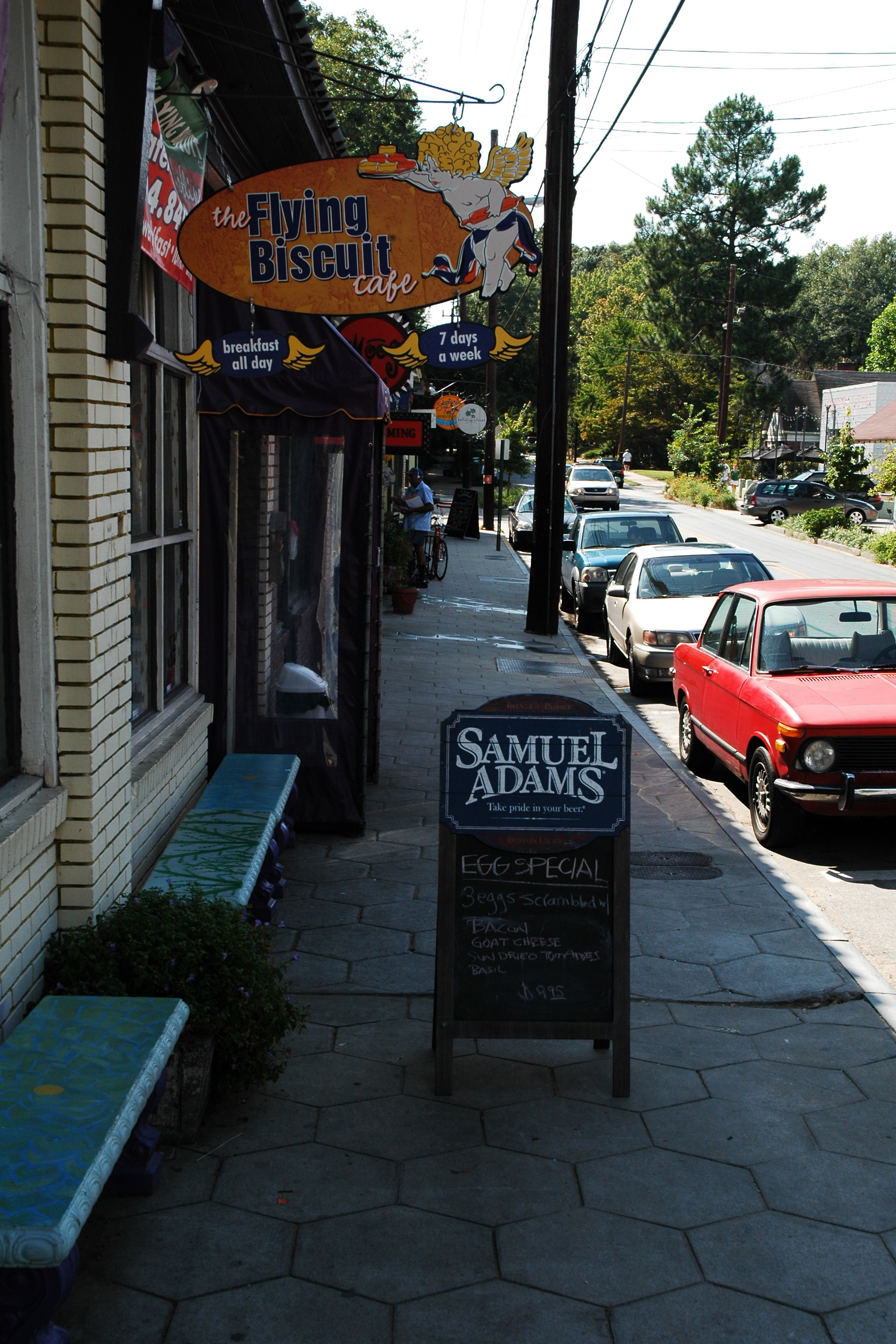 Candler Park, Atlanta